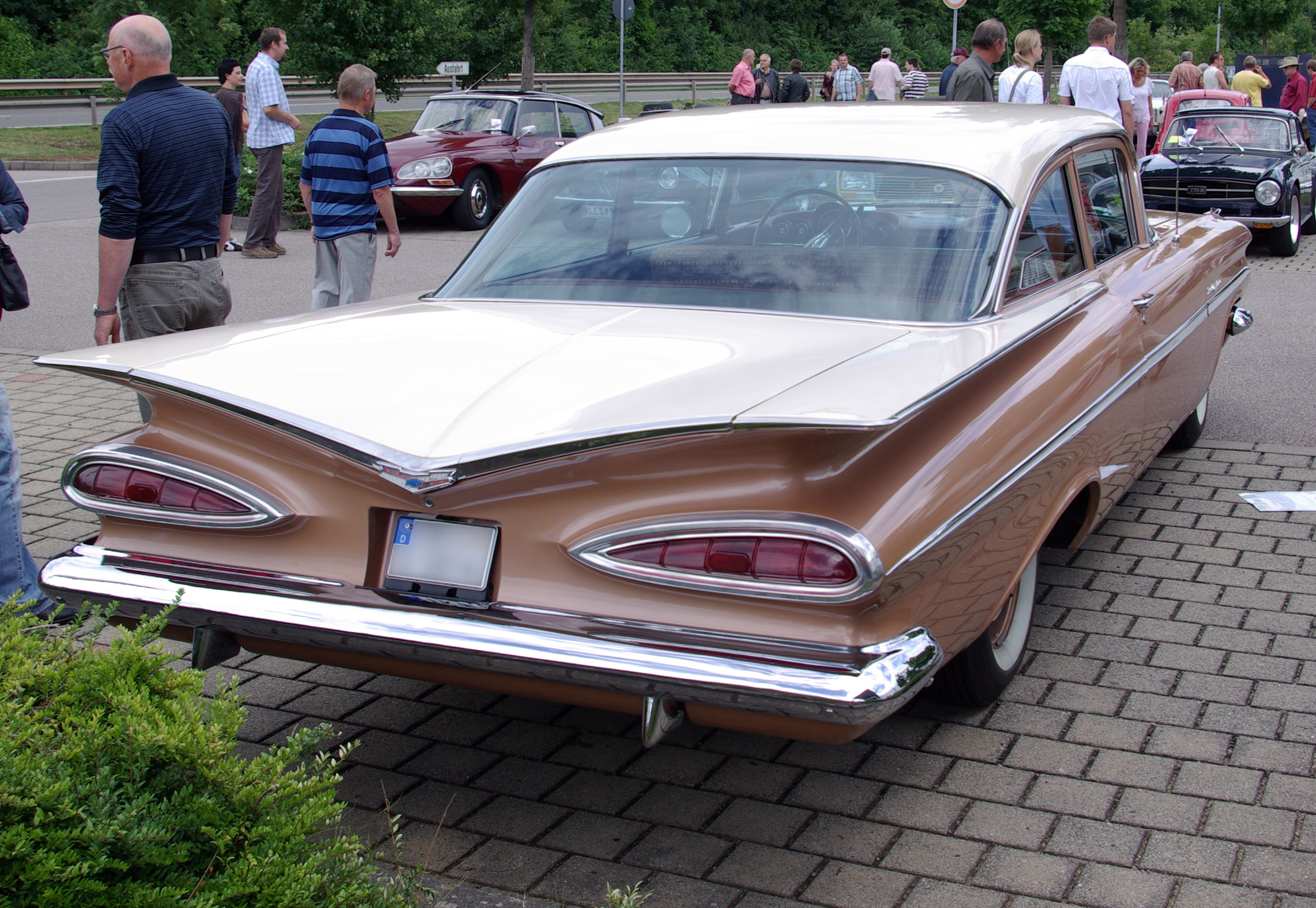 Chevrolet Bel Air Baujahr 1959 Leistung 270 PS